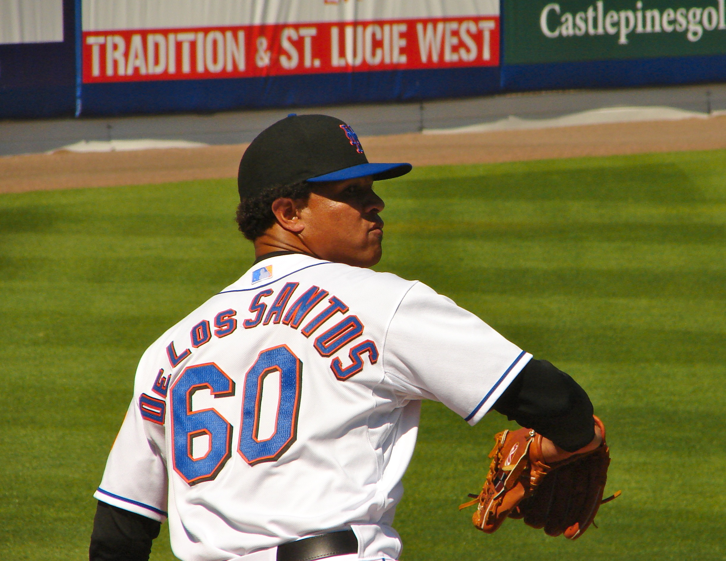 Valerio de los Santos